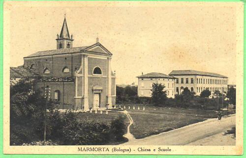 Marmorta inizio del '900